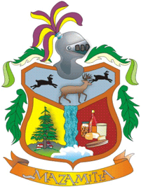 escudo de mazamitla jalisco